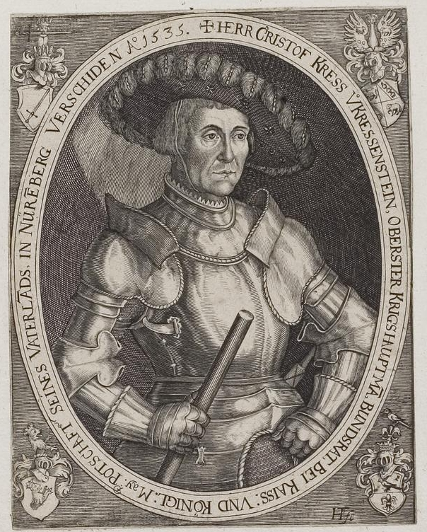 Grafik aus dem Klebeband Nr. 3 der Fürstlich Waldeckschen Hofbibliothek Arolsen Motiv: Christoph Kress von Kressenstein (1484–1535), Oberster Hauptmann; Kriegsrat des Schwäbischen Bundes; Unterzeichner der Confessio Augustana